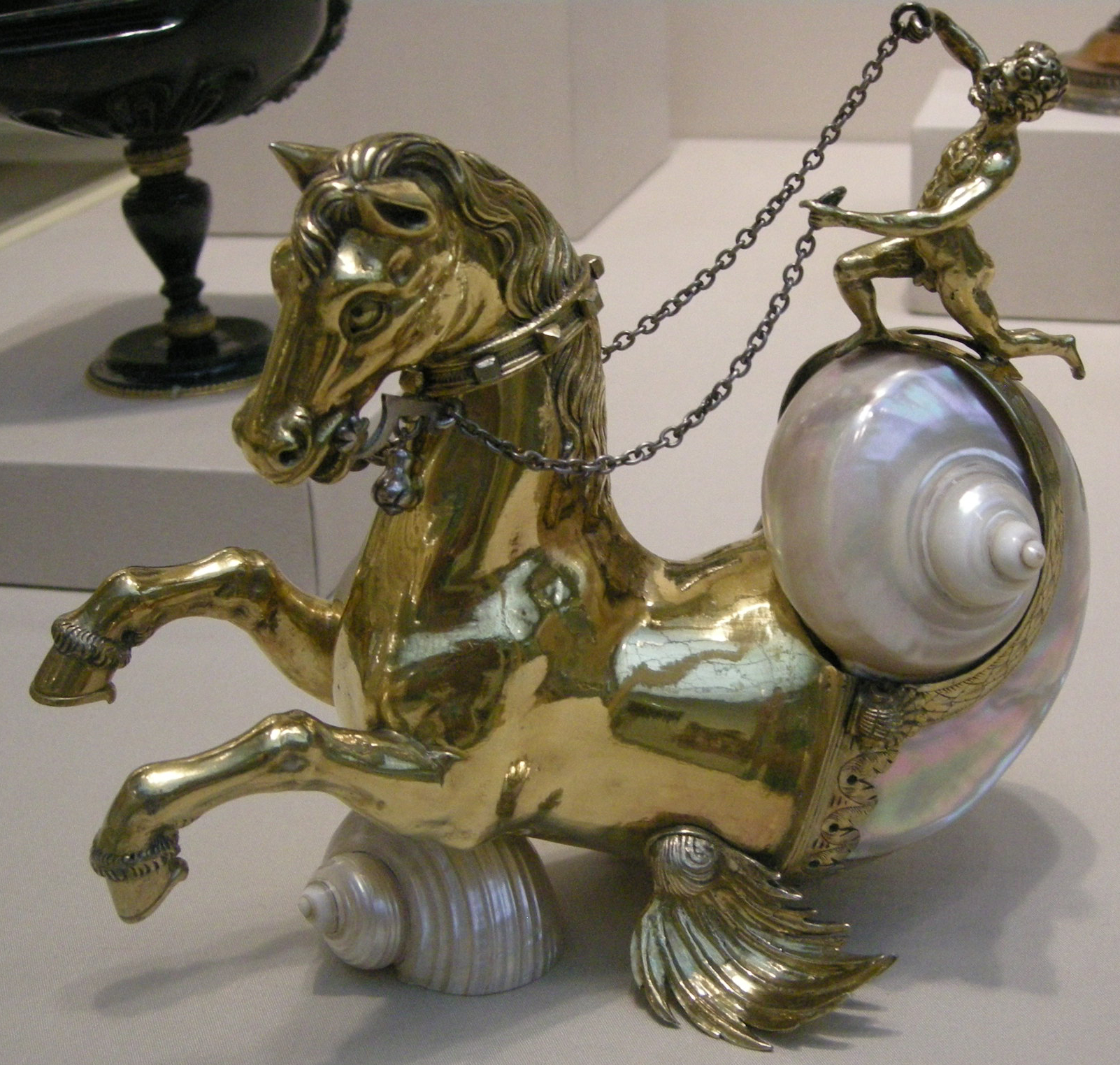 Arte tedesca (Lipsia), cavallo marino, 1590–1600 ca., argento dorato e conchiglia